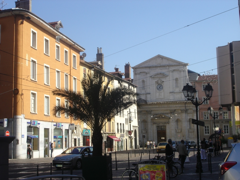 Chapelle de l'ancien collège des Jésuites, aujourd'hui lycée Stendhal, Grenoble (Isère, France).